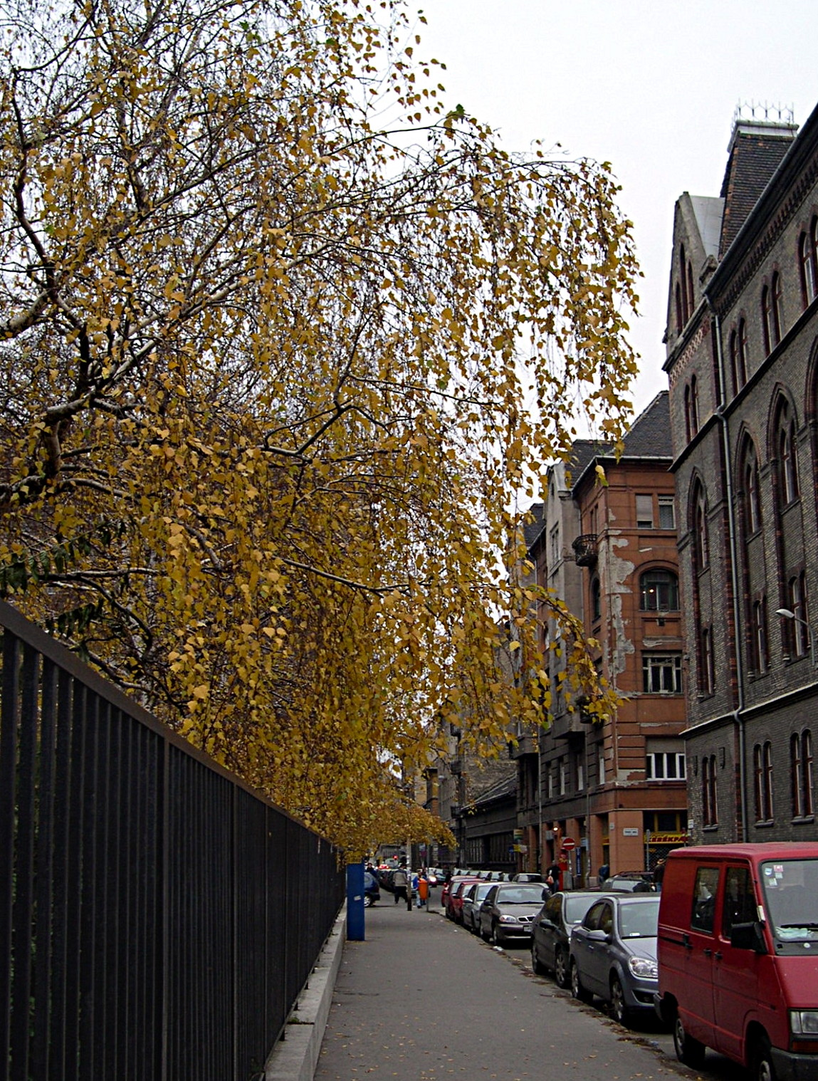 Budapest, VIII. kerület, József utca